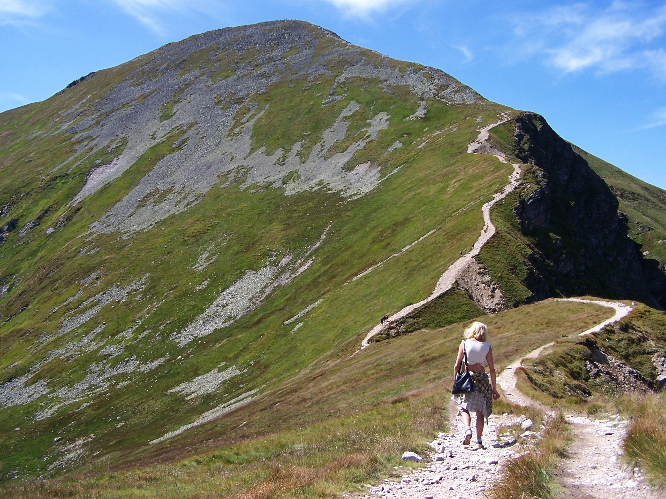 Starorobociański Wierch (Tatra Mountains)